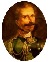 Descrição O liberal Carlos Alberto de Savóia, rei do Piemonte-Sardenha, foi derrotado pelos austríacos e teve de abdicar em favor de seu filho. Licença: 01:23, 19 Maio 2005 Marcoavgdm 160x200 (8758 bytes) (O liberal Carlos Alberto de Savóia, rei do Piemonte-Sardenha, foi derrotado pelos austríacos e teve de abdicar em favor de seu filho.)